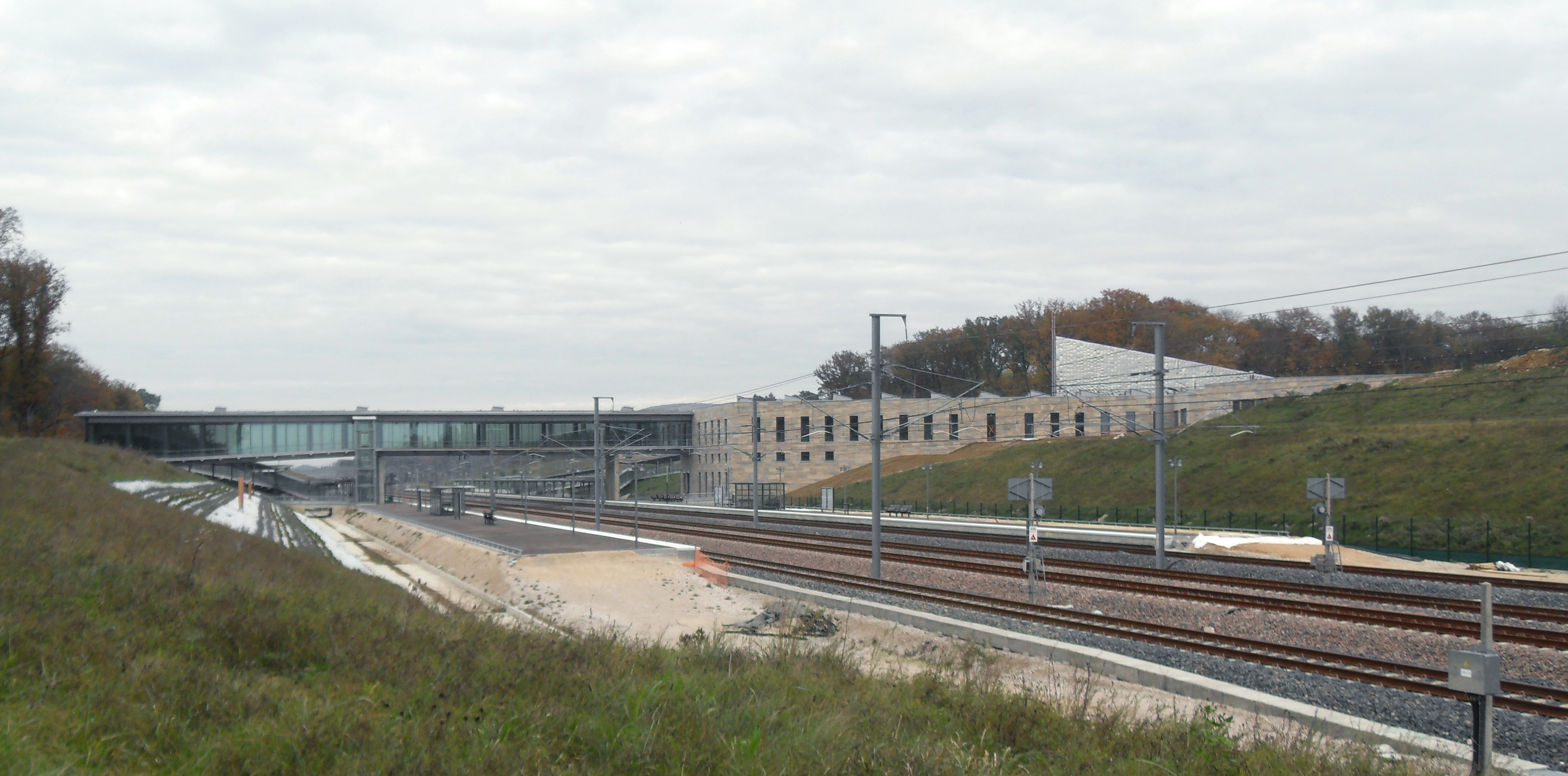 Vue générale de la gare de Besançon Franche-Comté TGV fin octobre 2011, un peu plus d'un mois avant sa mise en service.